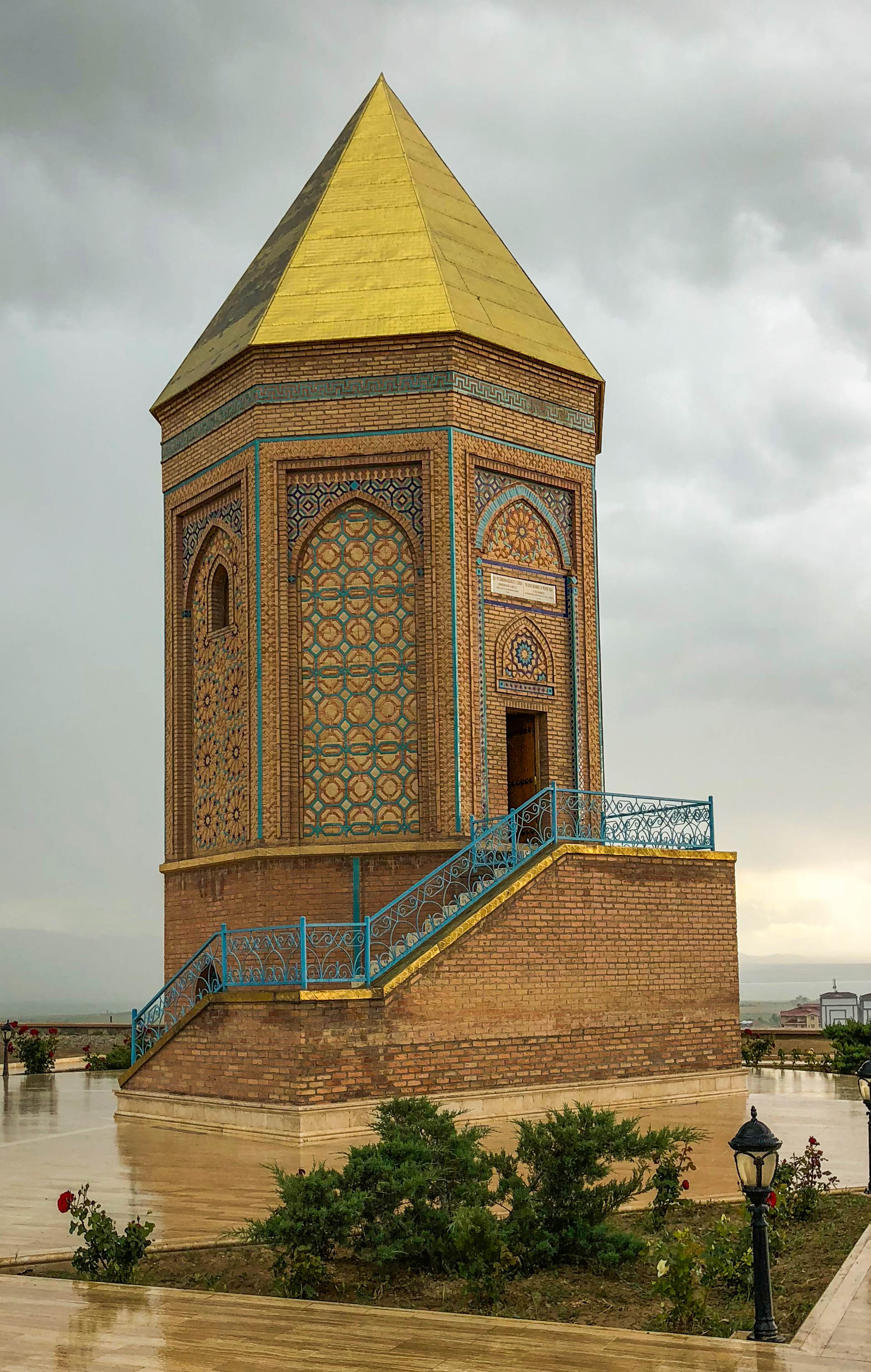 Nuh türbəsi